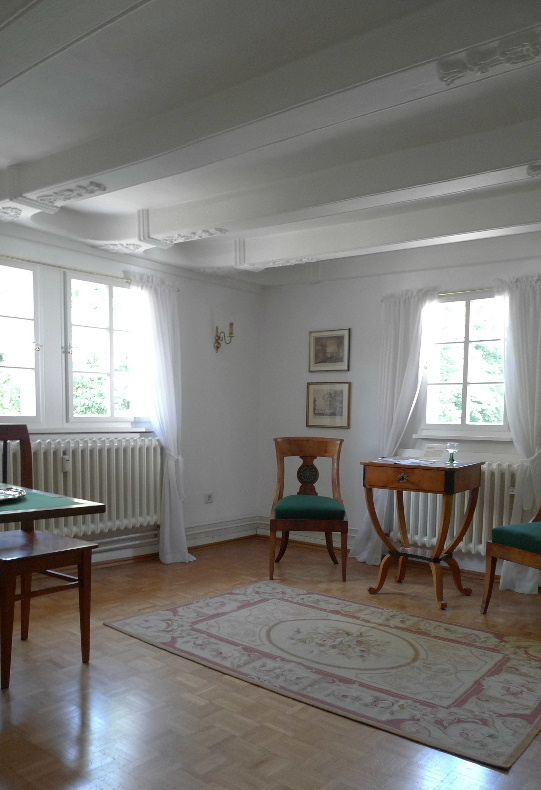 Kleiner Salon im Bürgermeister-Stroof-Haus in Vilich